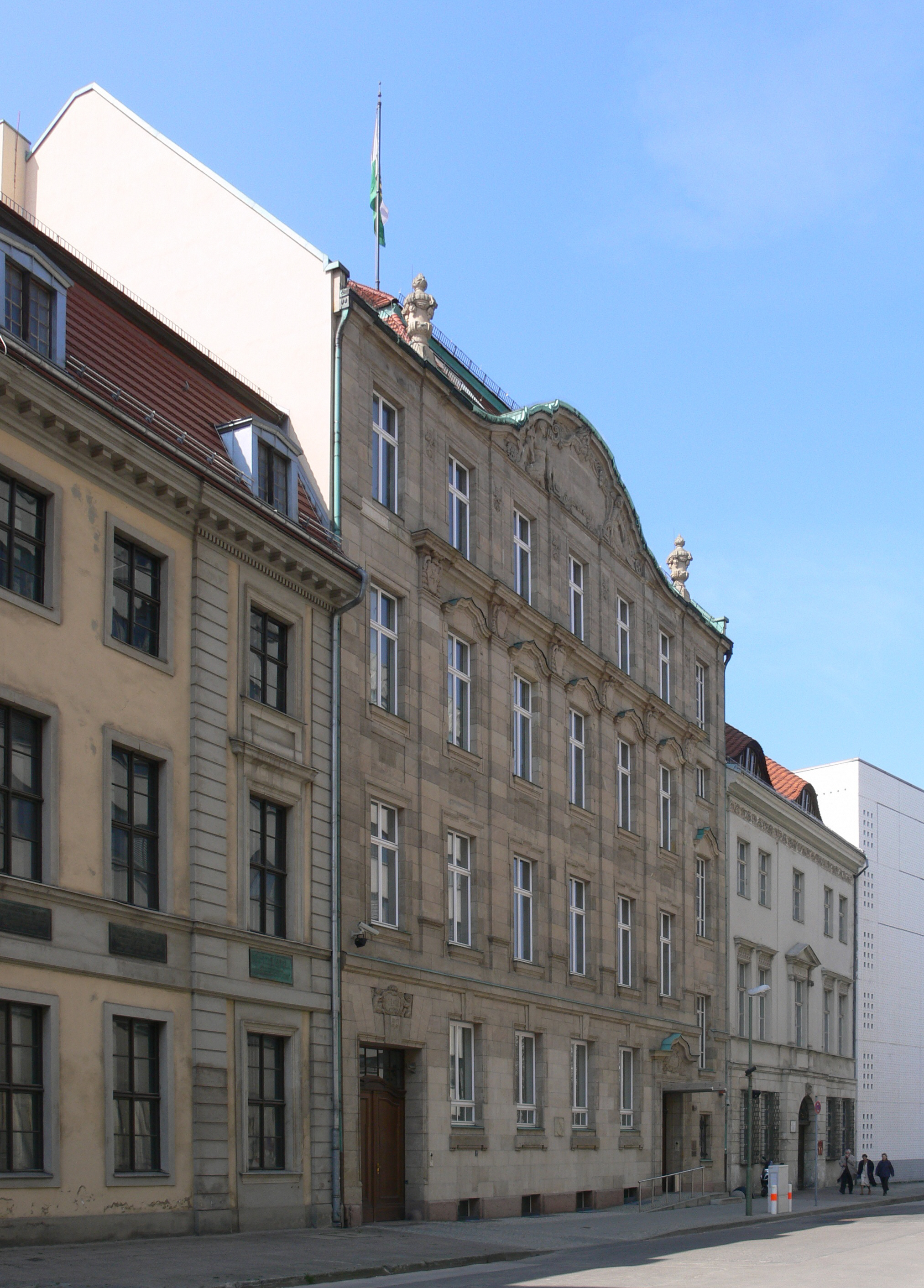 Berlin-Mitte, Brüderstraße 11-12, Sächsische Landesvertretung